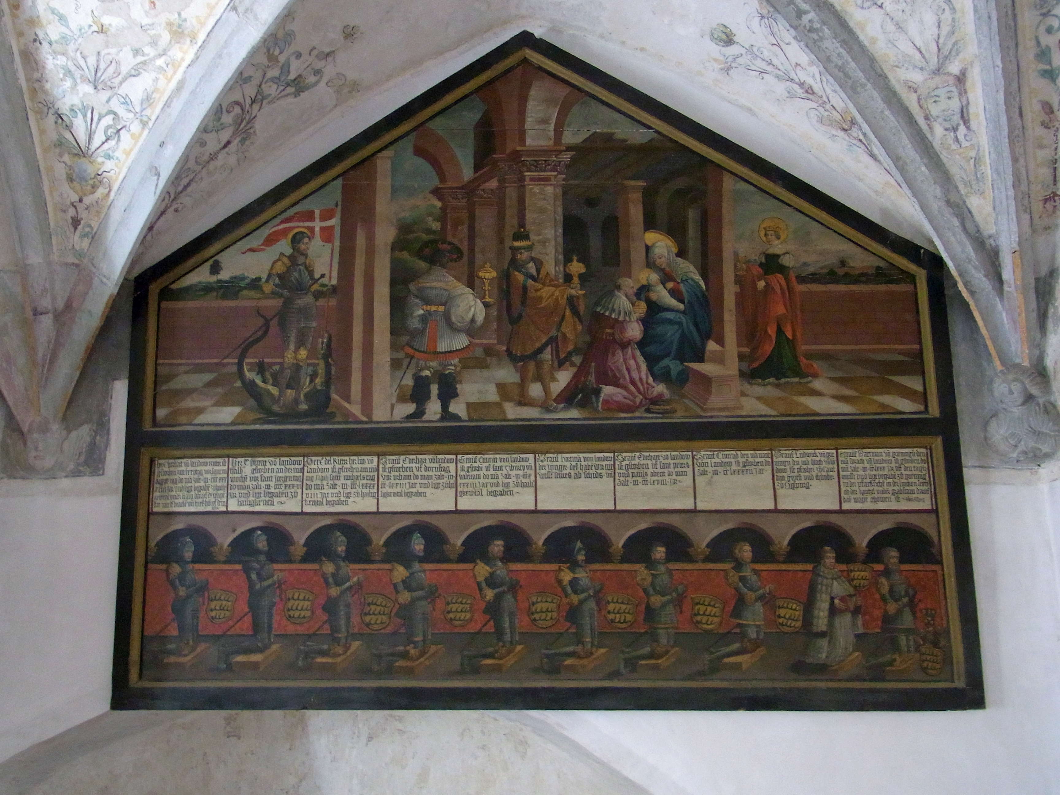 Ahnengalerie der Grafen von Grüningen-Landau und Herren von Landau im Kloster Heiligkreuztal (um 1540 erstellt; Abfolge und Sterbedaten teils fehlerhaft)